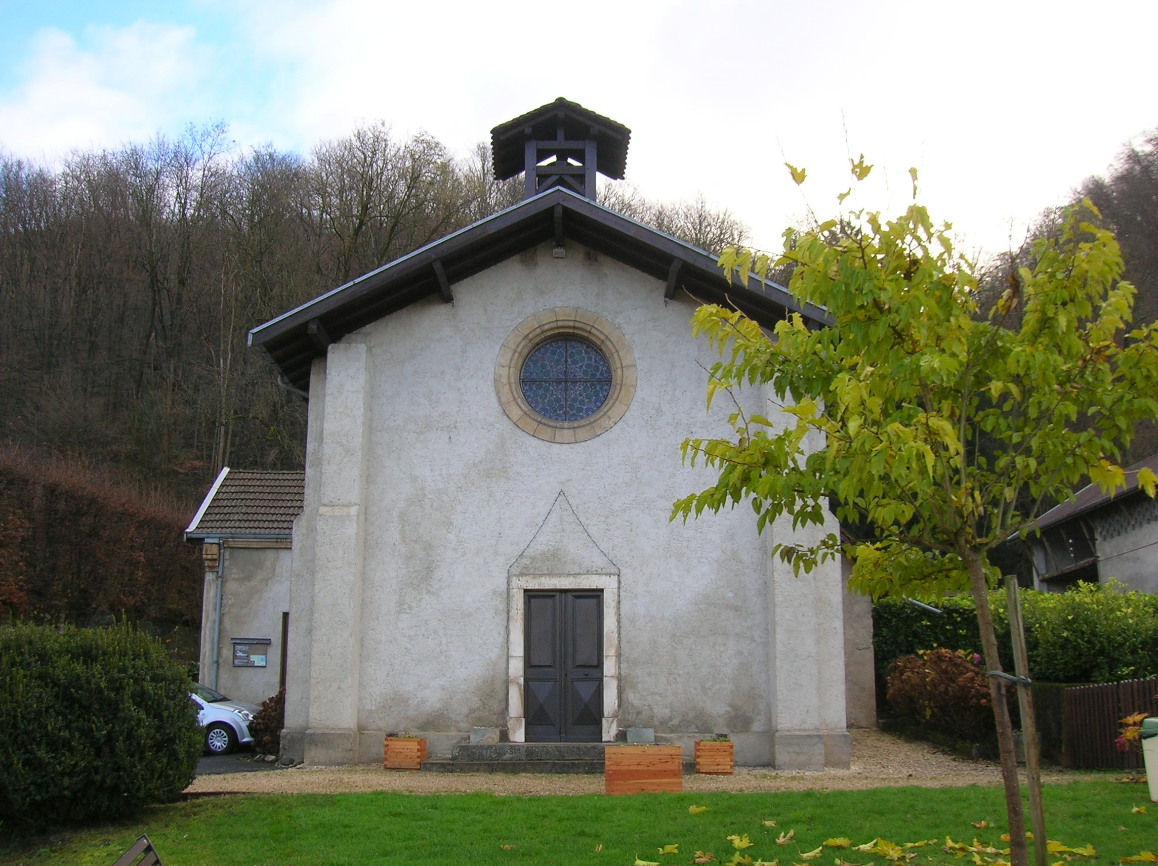 Murianette, Isère, France.